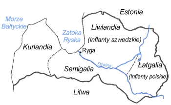 Historyczne krainy Łotwy